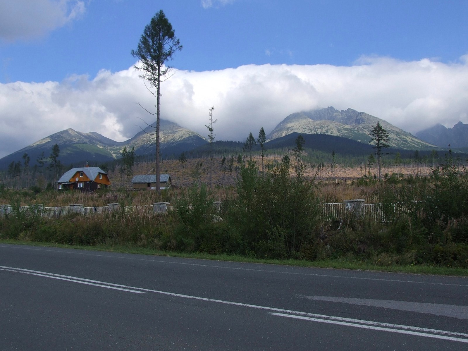 Tępa, Kończysta, Gerlach